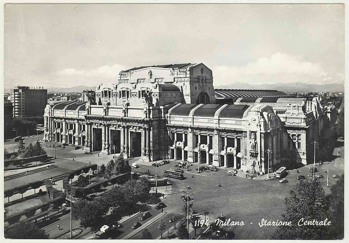 MI Milano Stazione Centrale